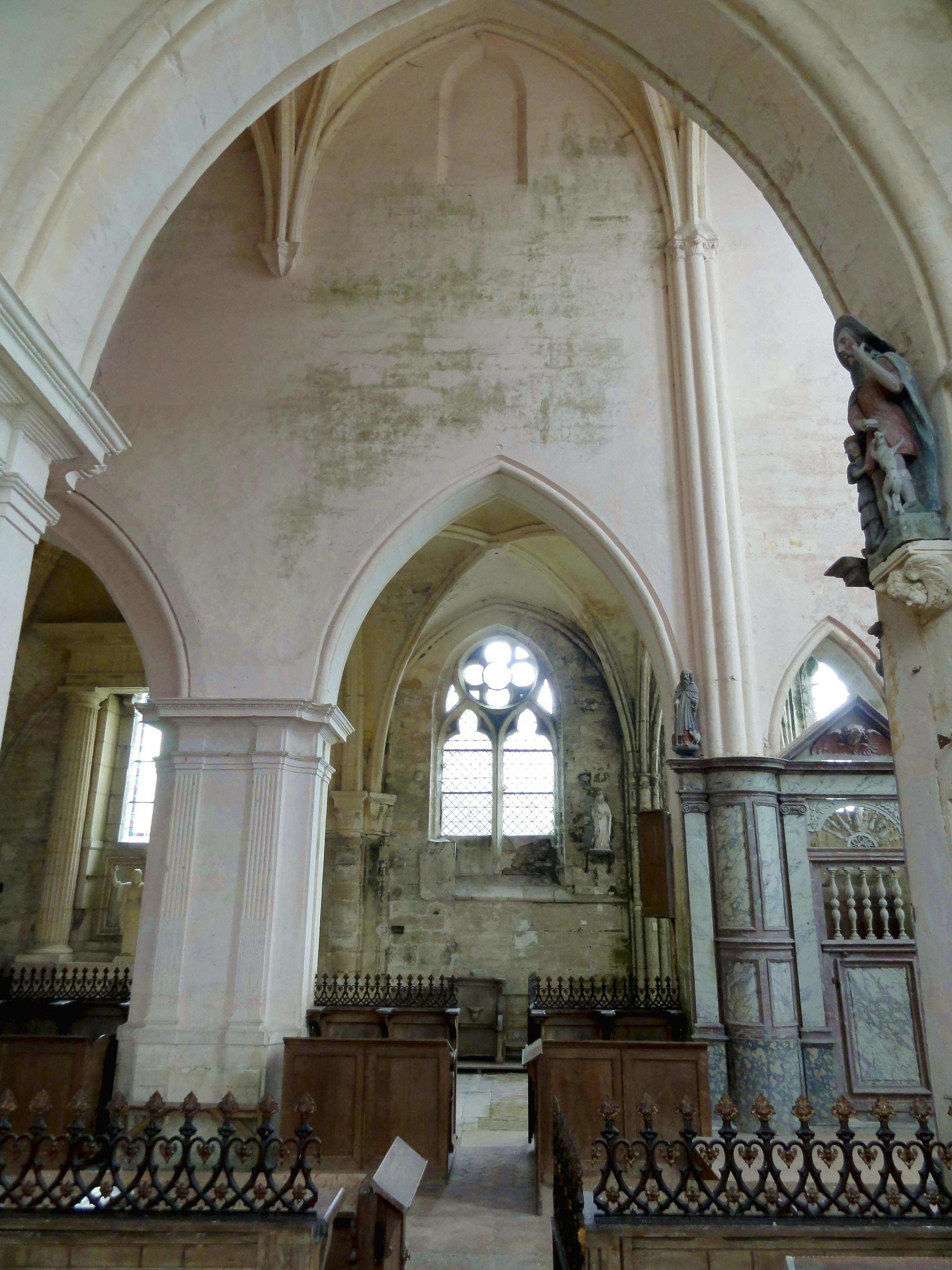 Intérieur de l'église (voir titre).